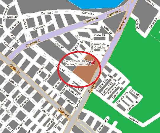 Mapa para la localización de Alamedas del Sinú